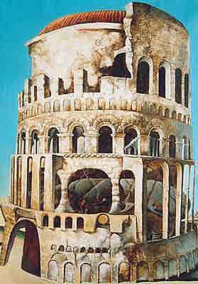 Babylonska veza